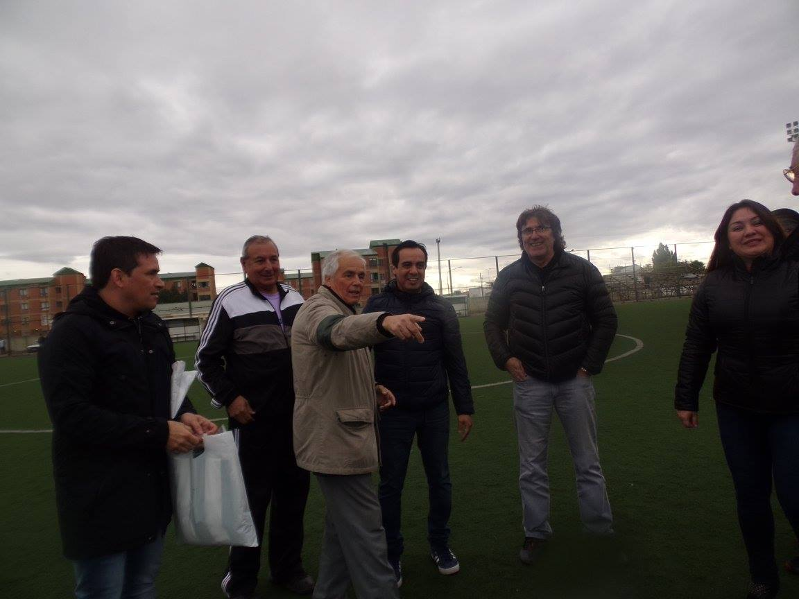 Homenaje 2018 a las glorias del albiverde